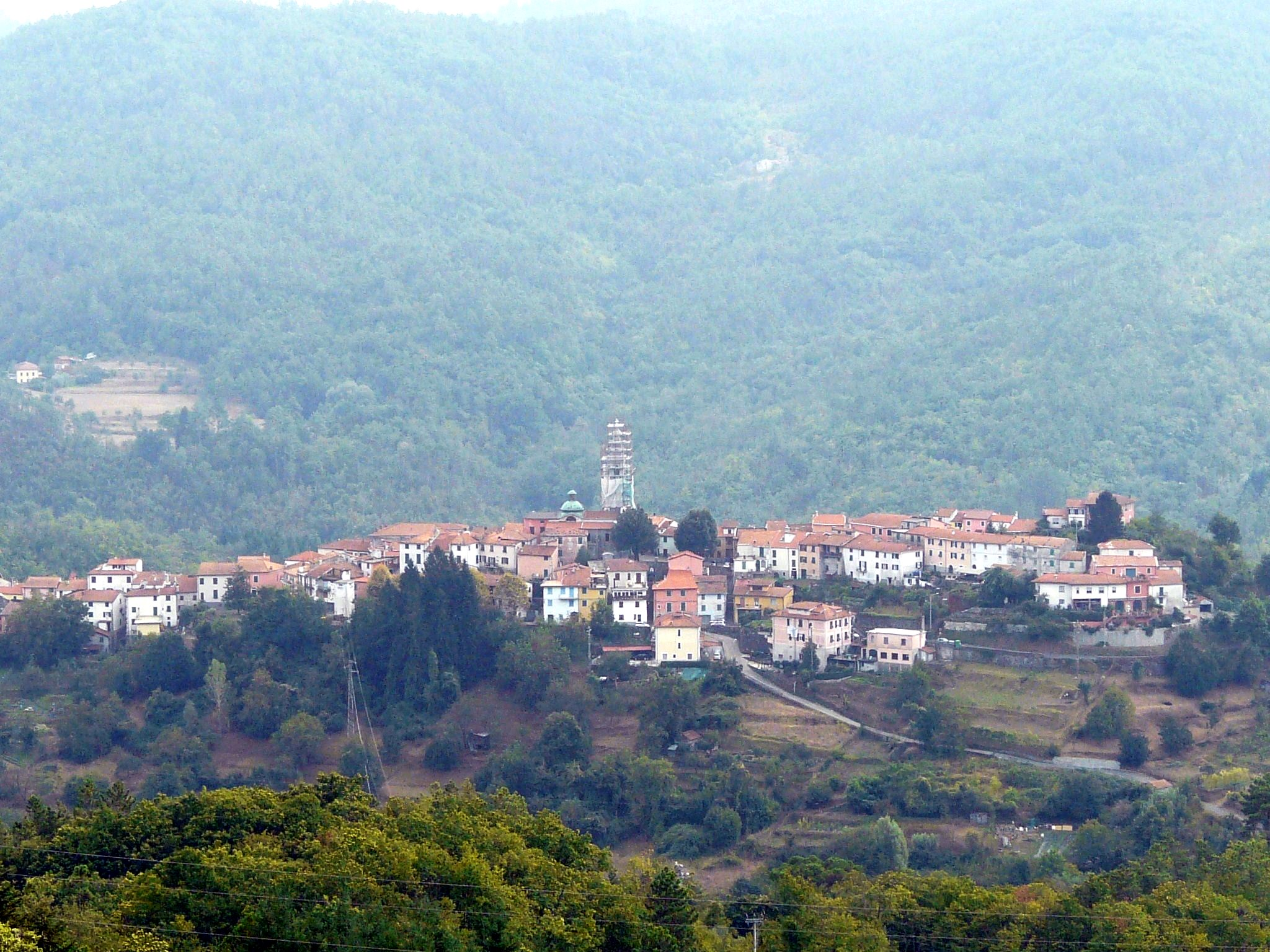 Panorama di Carro, La Spezia, Liguria, Italia